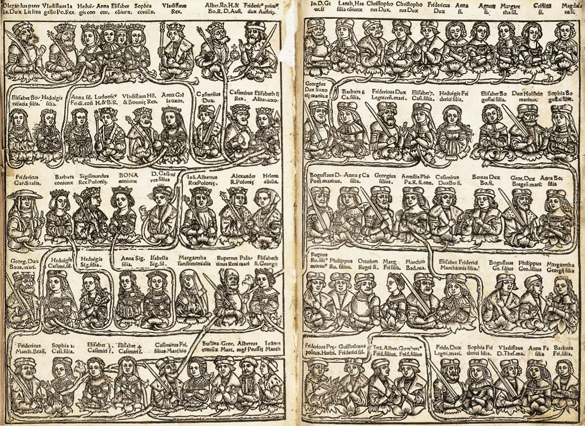 Беларуская (тарашкевіца): Фамільнае дрэва дынастыі Гедзімінавічаў (Giedziminavičy) і Ягайлавічаў (Jagajłavičy)